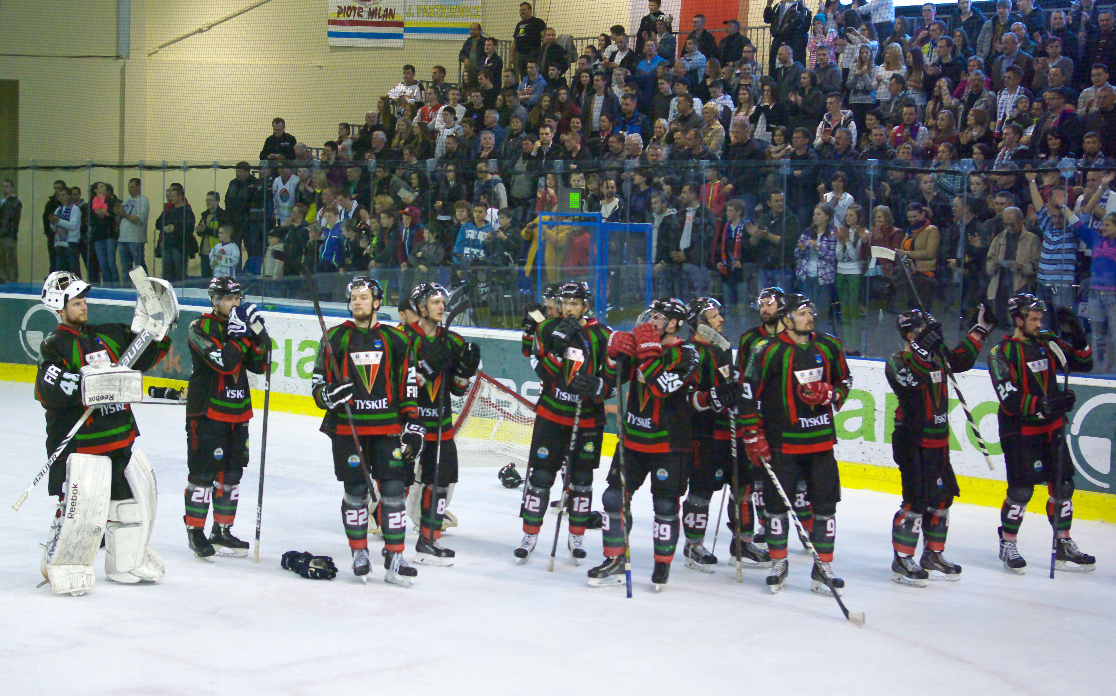 Szósty mecz finałowy o mistrzostwo Polski w hokeju na lodzie w sezonie PHL 2013/2014: Ciarko PBS Bank KH Sanok – GKS Tychy (2:0), 3 kwietnia 2014 w Sanoku (Arena Sanok)